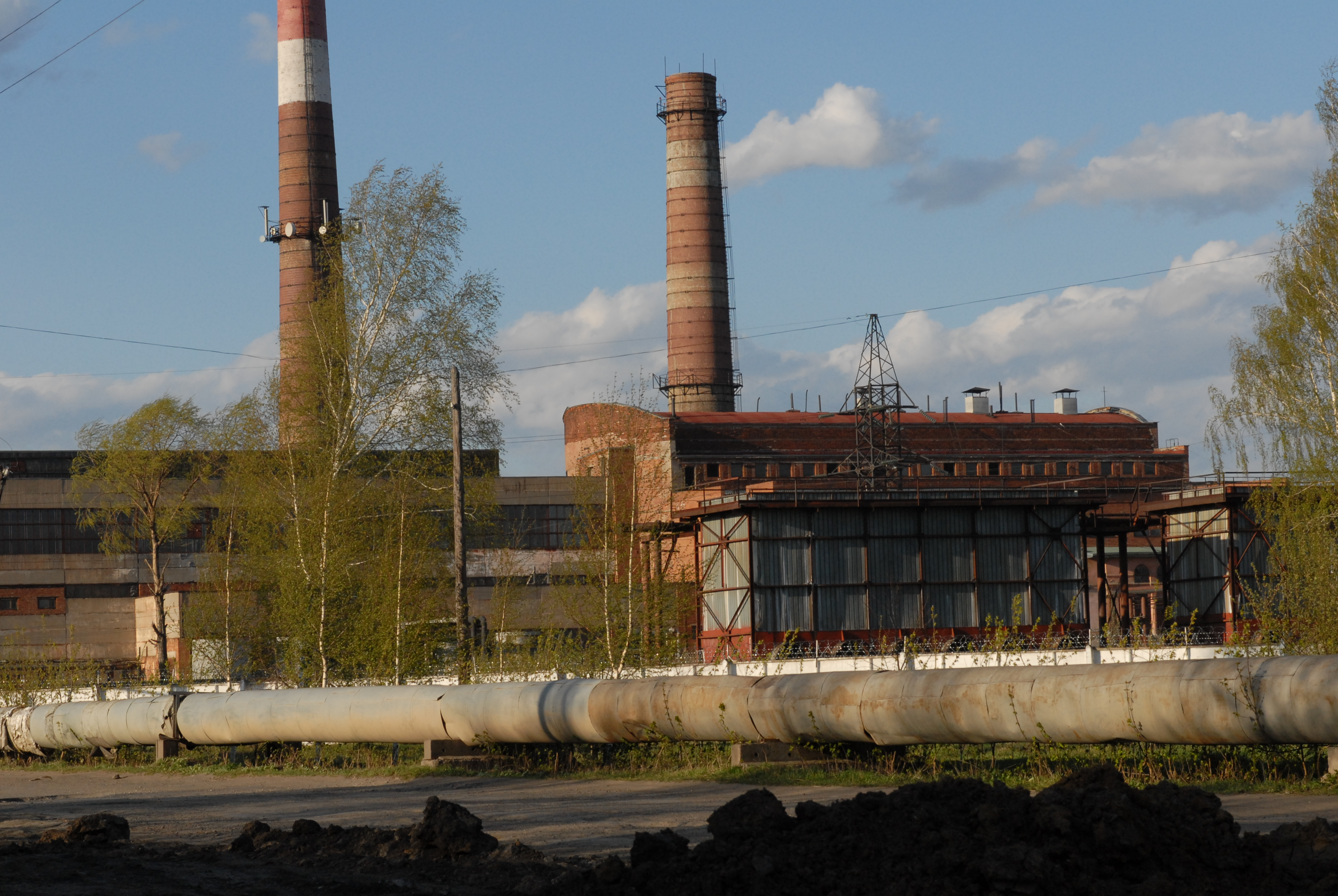 Один из цехов КВРЗ